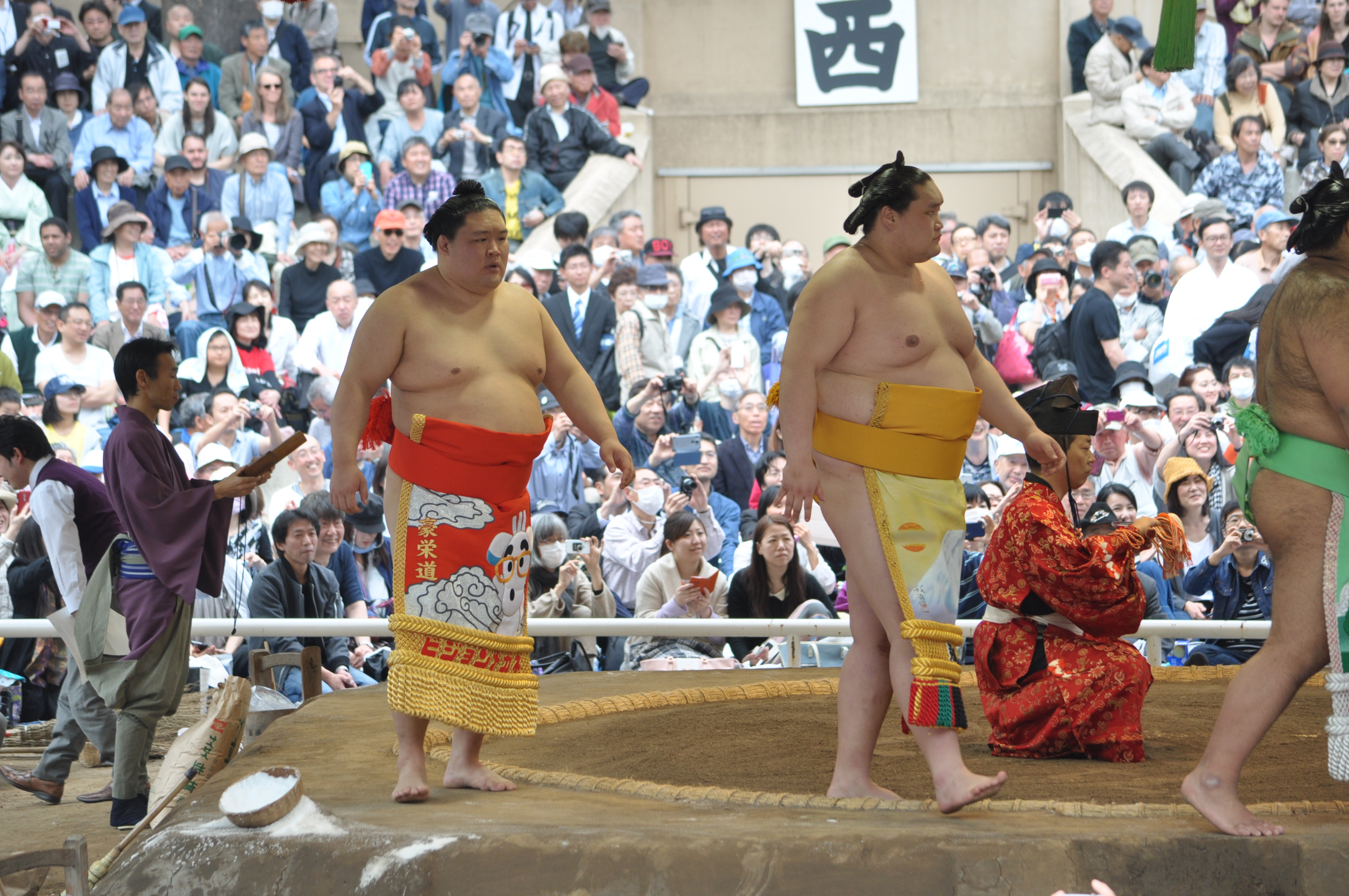 豪栄道豪太郎